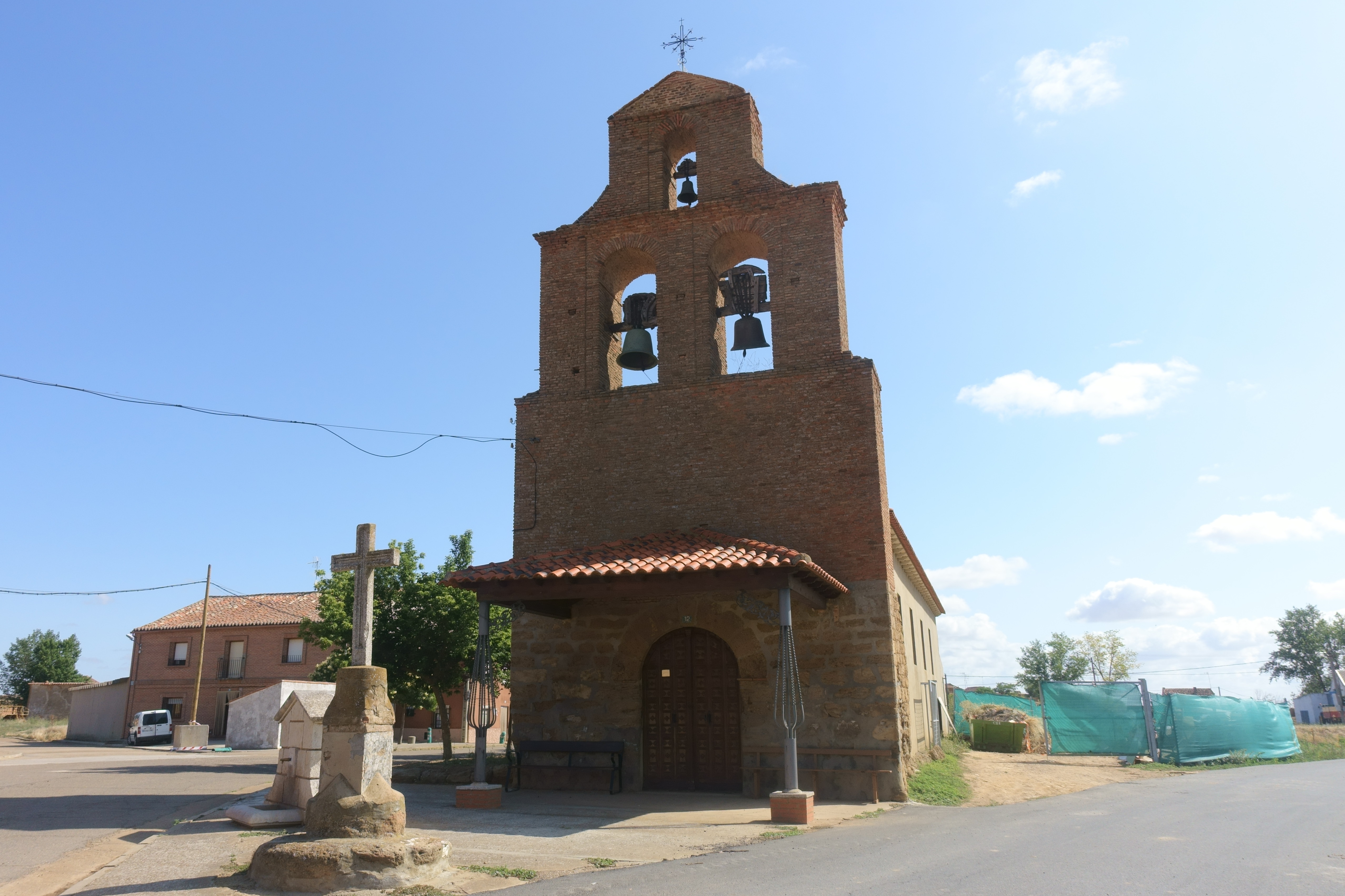 Ermita del Cristo, en La Unión de Campos (Valladolid, España).